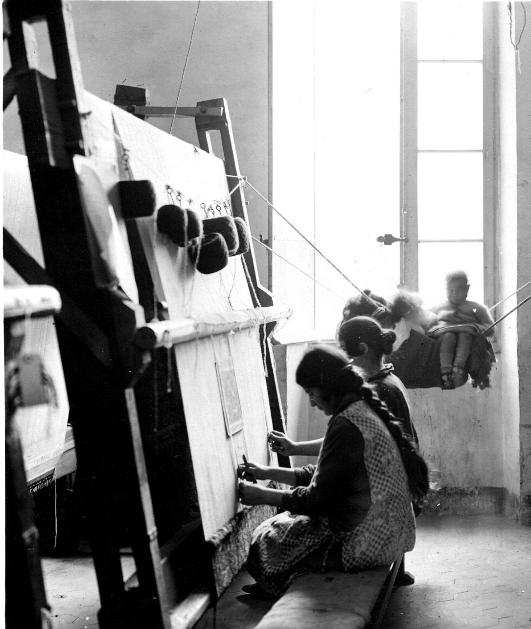 Illustration de l'aspect social de la Société Tapis France Orient. Les femmes au métier amenant leurs enfants au travail. Coll. A. Tchouhadjian